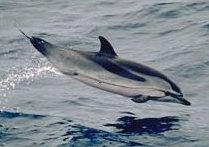 Blau-Weißer Delfin